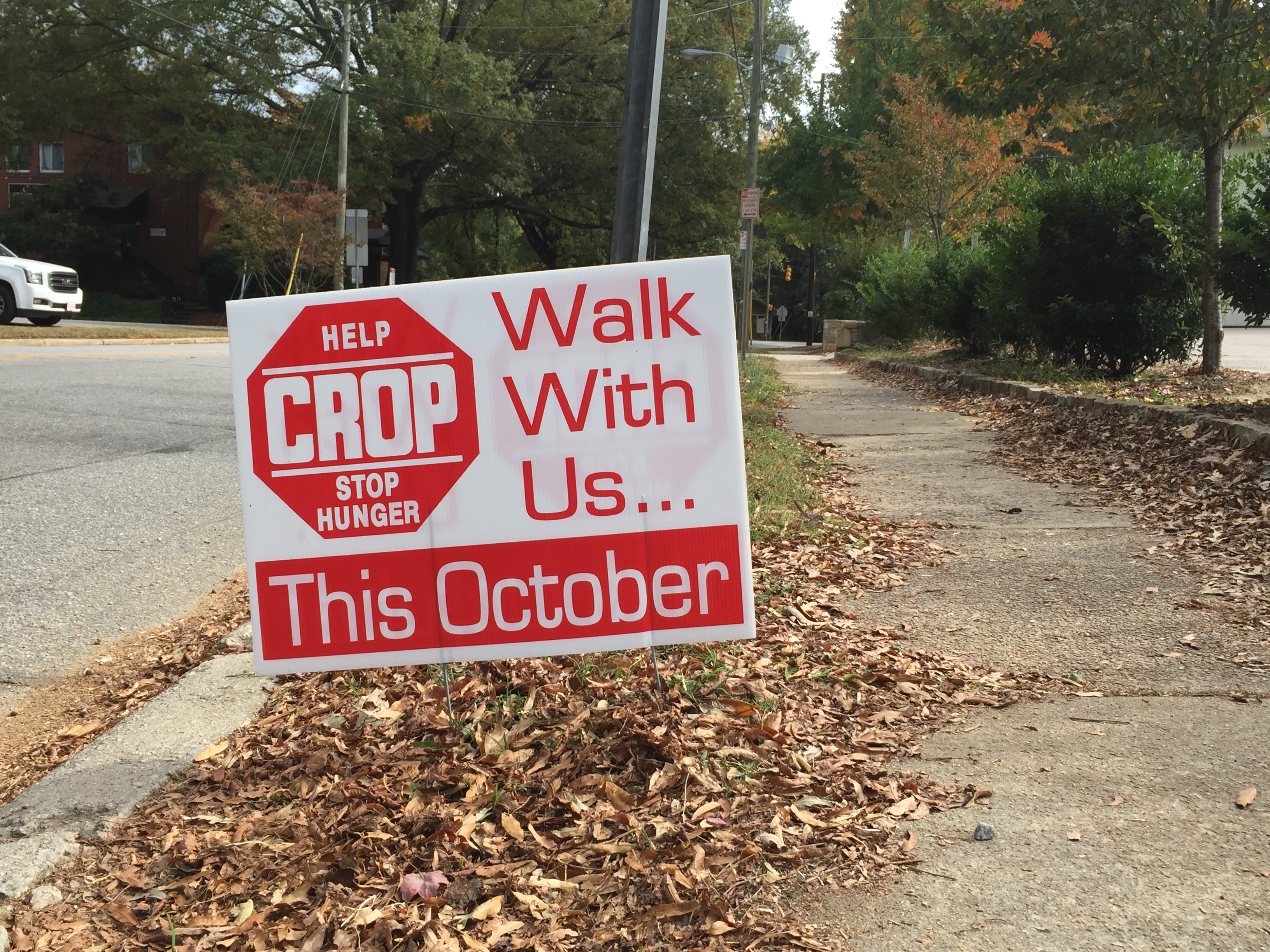 Raleigh CROP Hunger Walk 2015